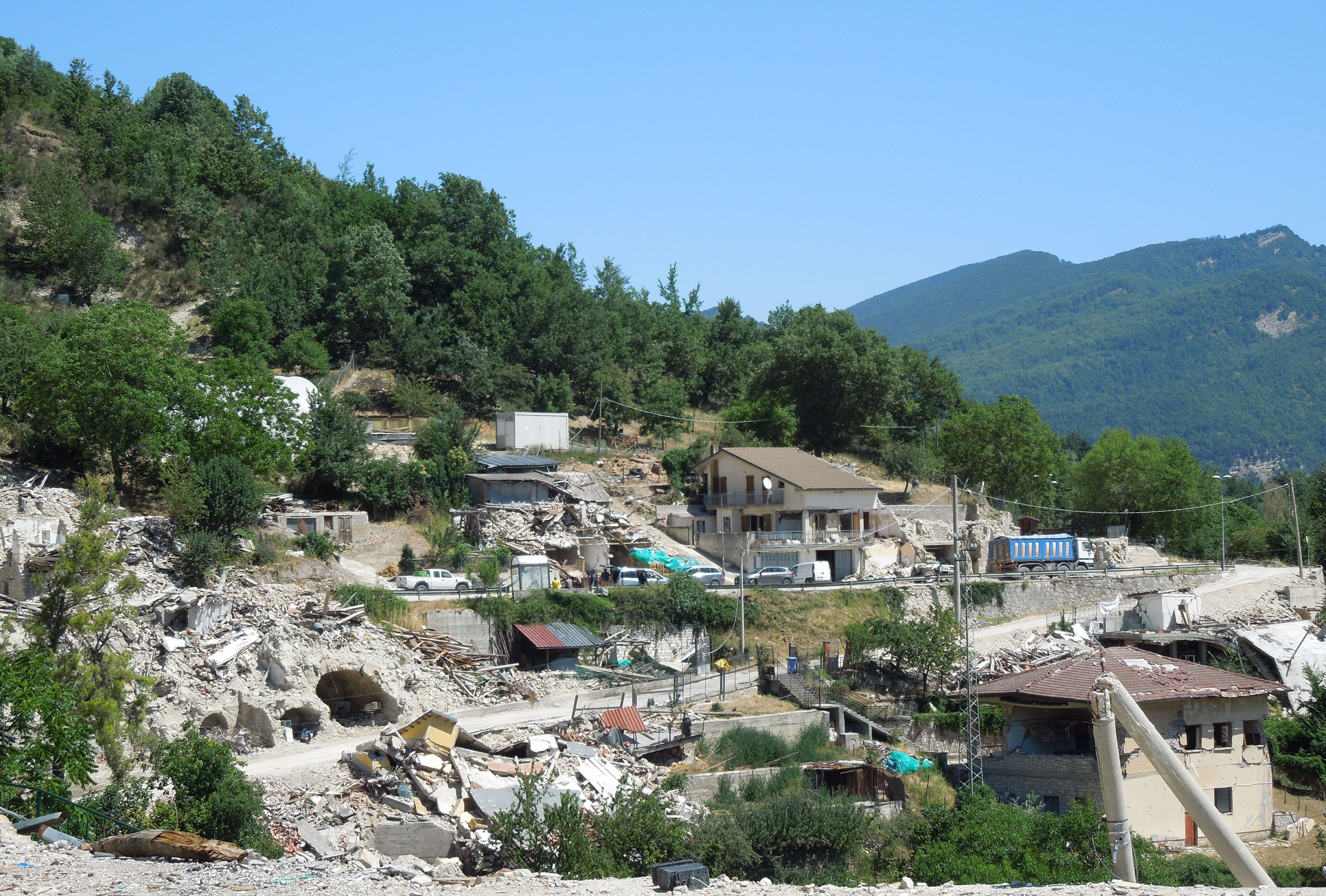 Panorama del paese di Pescara del Tronto che inquadra le macerie dell'abitato che sorgeva lungo la Vecchia Salaria, oggi SP129. L'immagine è stata scattata all'interno della zona rossa il 27 luglio 2017.